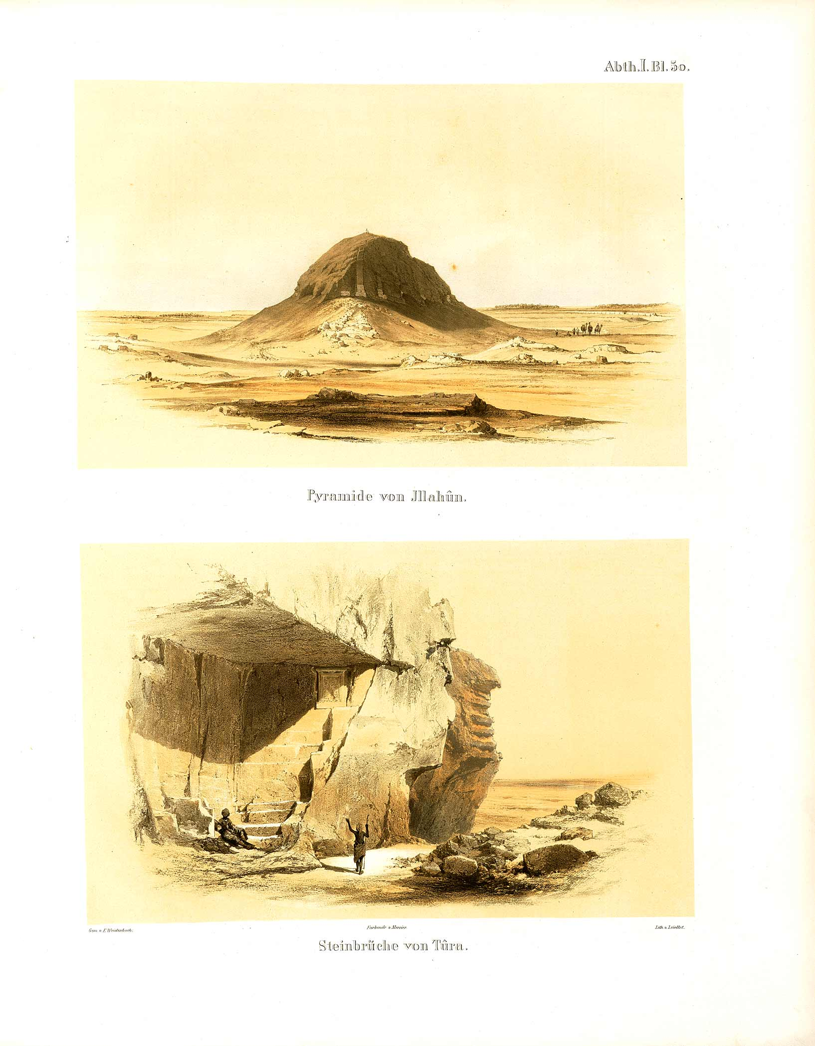 Denkmaeler aus Aegypten und Aethiopien nach den Zeichnungen der von Seiner Majestät dem Koenige von Preussen, Friedrich Wilhelm IV., nach diesen Ländern gesendeten, und in den Jahren 1842–1845 ausgeführten wissenschaftlichen Expedition auf Befehl Seiner Majestät מצבות זיכרון ממצרים ואתיופיה על פי הציורים שצוירו בהוראת הוד רוממותו מלך פרוסיה פרידריך הרביעי, בידי משלחות מדעיות בשנים 1842-1845 ששוגרו בפקודת הוד רוממותו